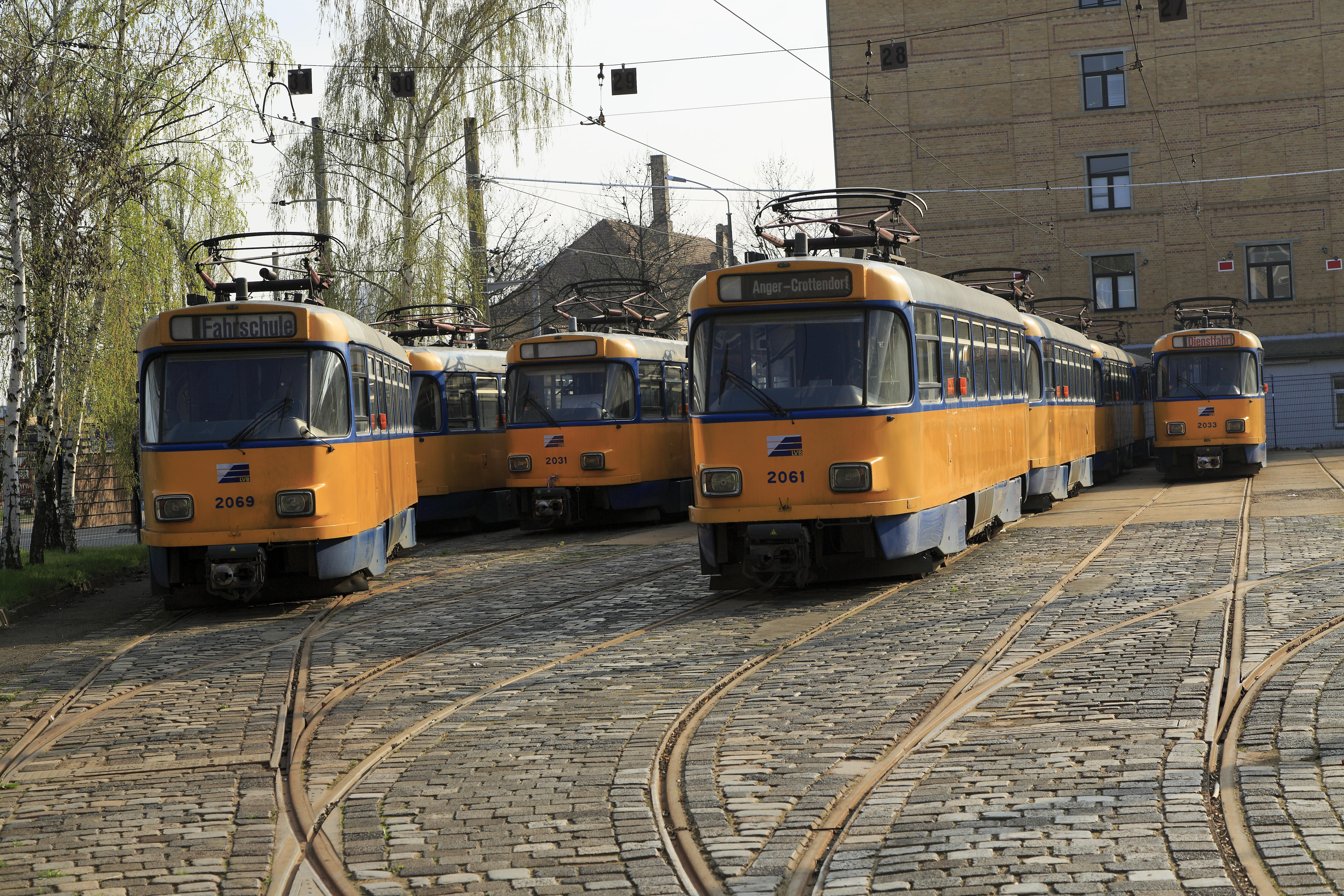 Triebwagen des Typs 33d, gebaut wurden sie 1982 und 1983, in den Typ 33d umgebaut 1996 und 1997. Abnehmer gibt es offenbar nicht mehr, zum Aufnahmezeitpunkt ist nicht absehbar, dass die Wagen im Sommer 2017 zerlegt werden würden.